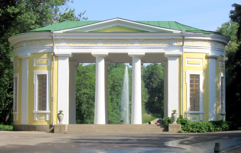 Павильон Флоры.